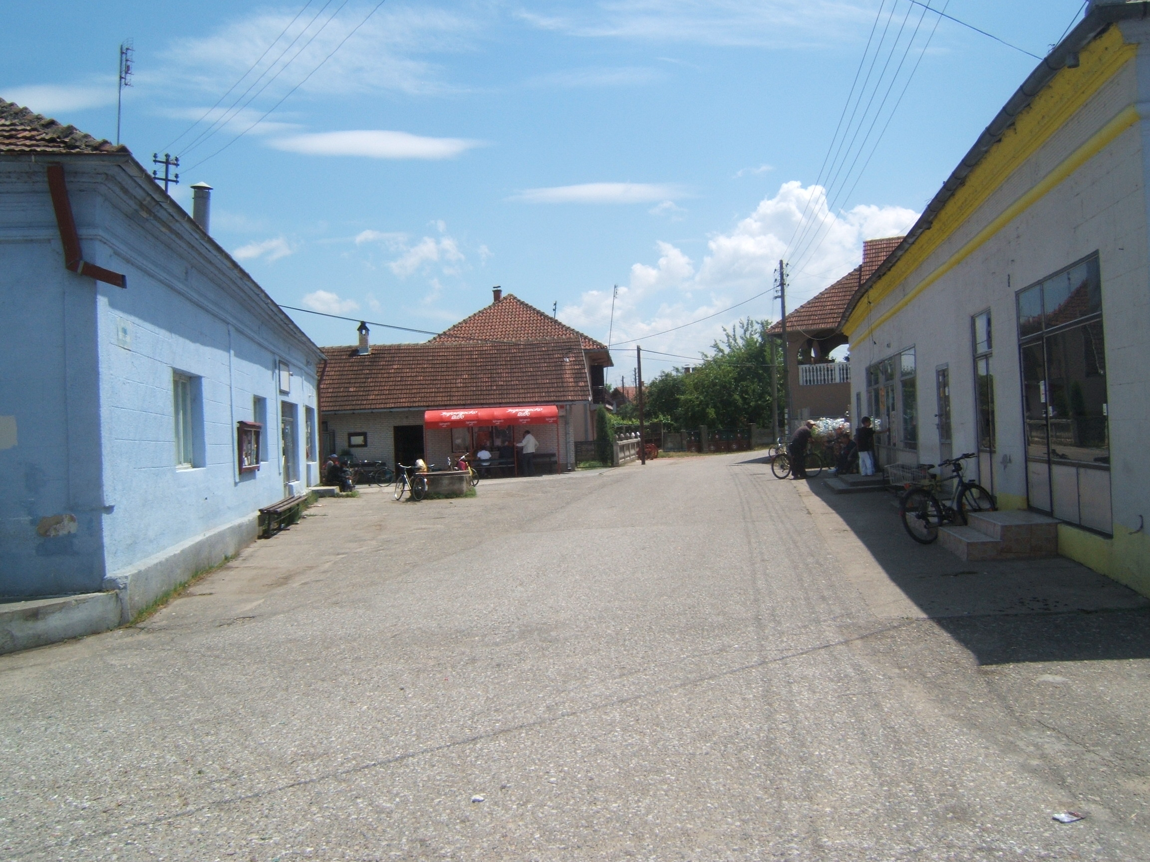 Село Тргу Корбову, Србија / Selo Trgu Korbovu, Srbija